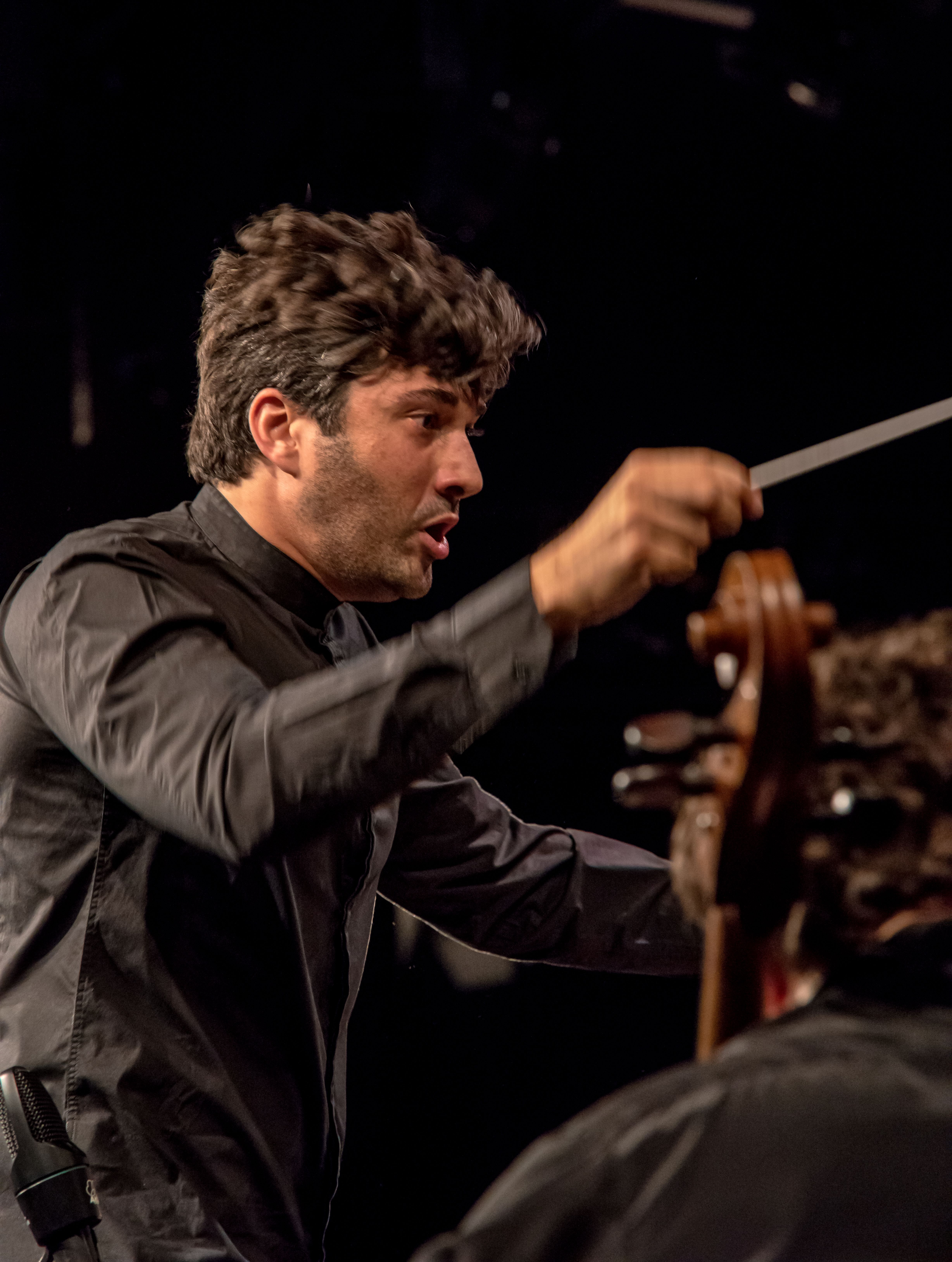 Bilder vom Zelt Musik Festival 2016 in Freiburg im Breisgau Die Gala